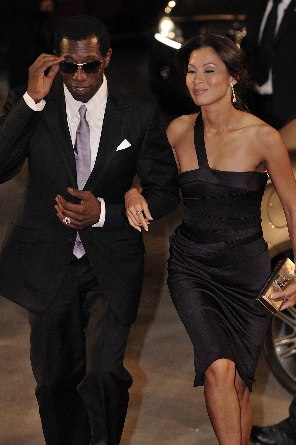 66ème Festival du Cinéma de Venise (Mostra), 8ème jour (07/09/2009) Tapis rouge avec Ethan Hawke et Wesley Snipes et le réalisateur Antoine Fuqua pour le film : Brooklyn's finest